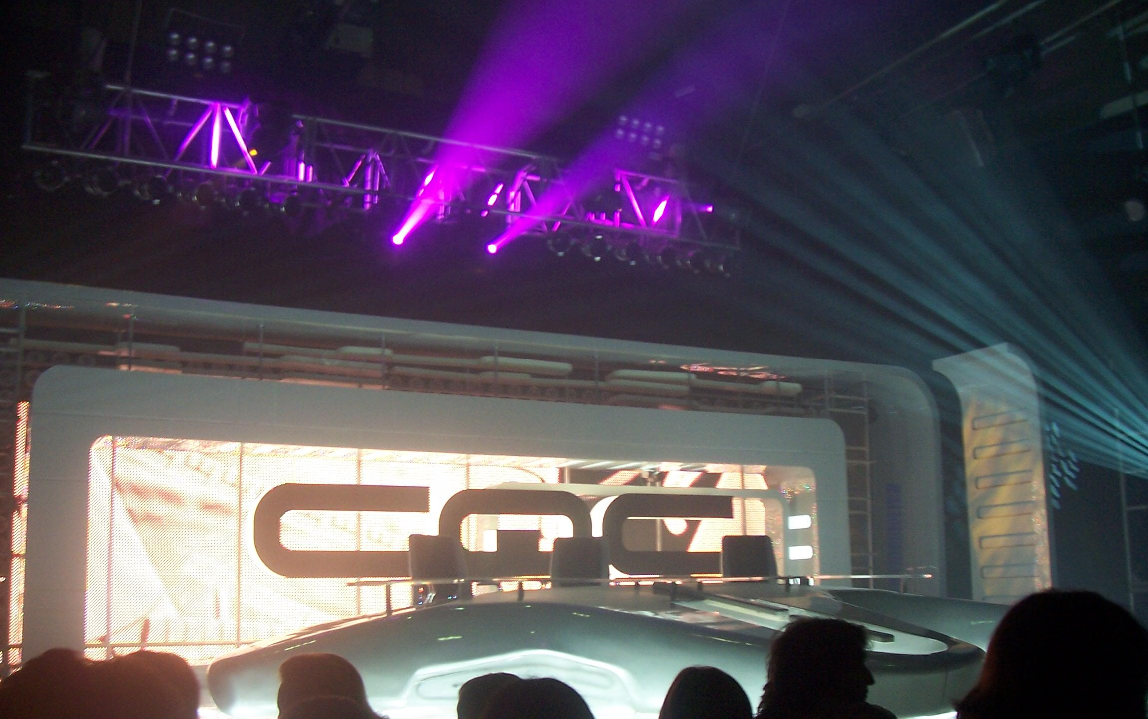 Estudio de Caiga Quien Caiga, en Telefé (Argentina).